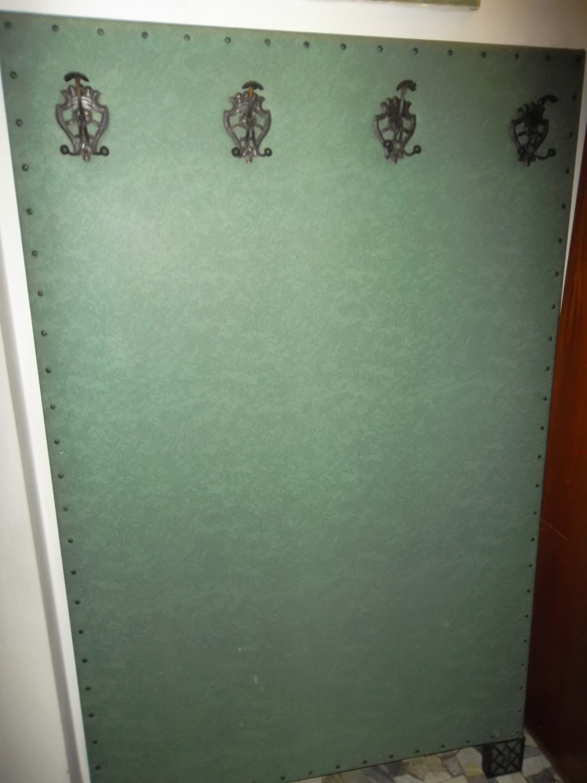 Oggetto di arredamento domestico realizzato artigianalmente: interno in legno, esterno in ferro battuto e finta pelle.